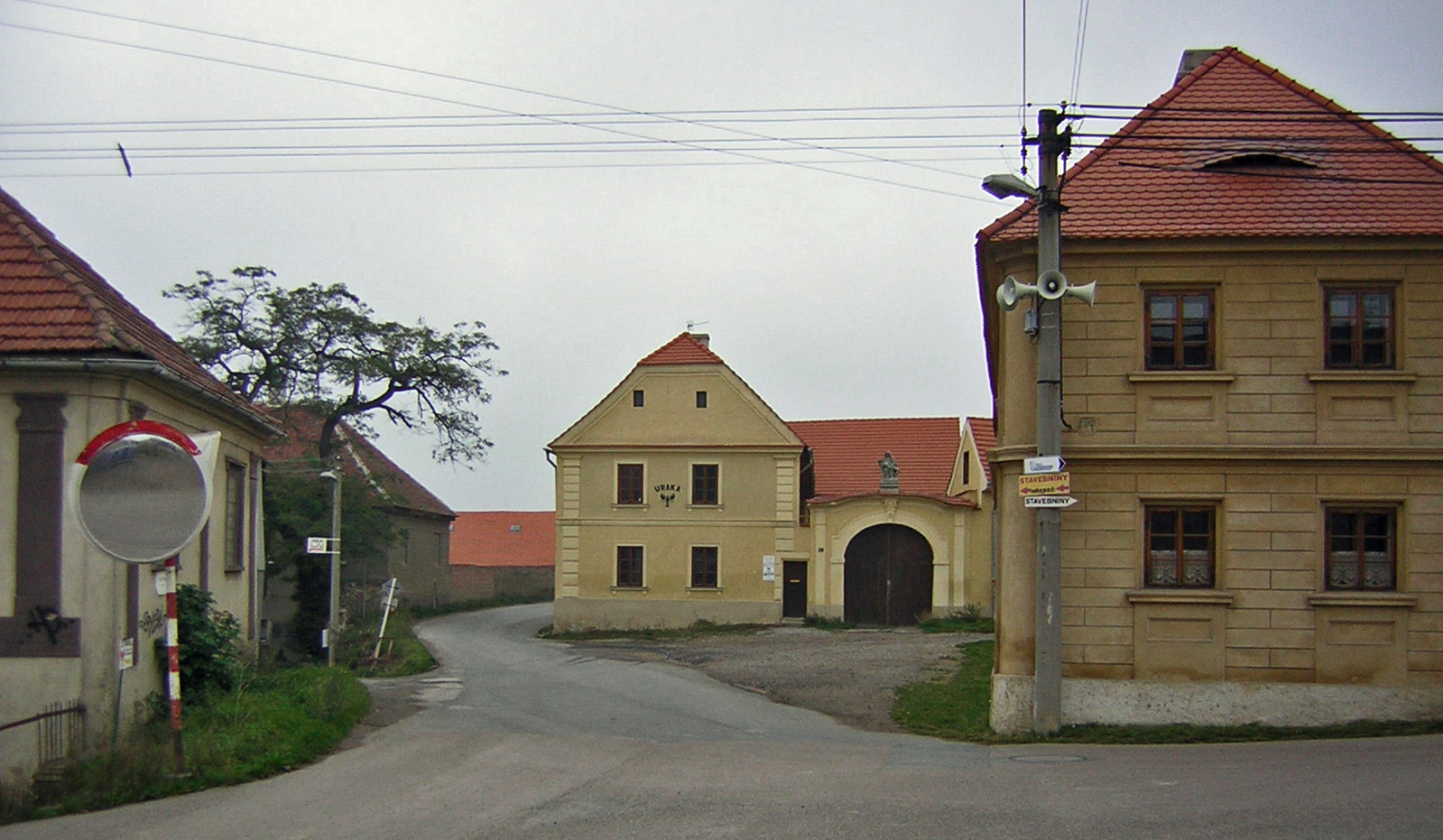 Dobrovíz, okres Praha-západ. Vesnická památková rezervace. Průhled z návsi do vyustění ul. Kladenská. Po levici v popředí usedlost čp 21 a v pozadí čp 19. Uprostřed s branou čp 15, po pravici vpředu čp 14.